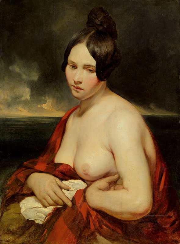 Die Frau vom Meer